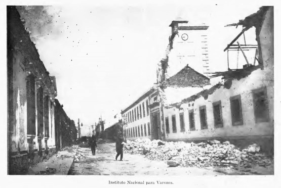 Efectos del Terremoto de 1917-18 en el Instituto Nacional Central para varones en la Ciudad de Guatemala